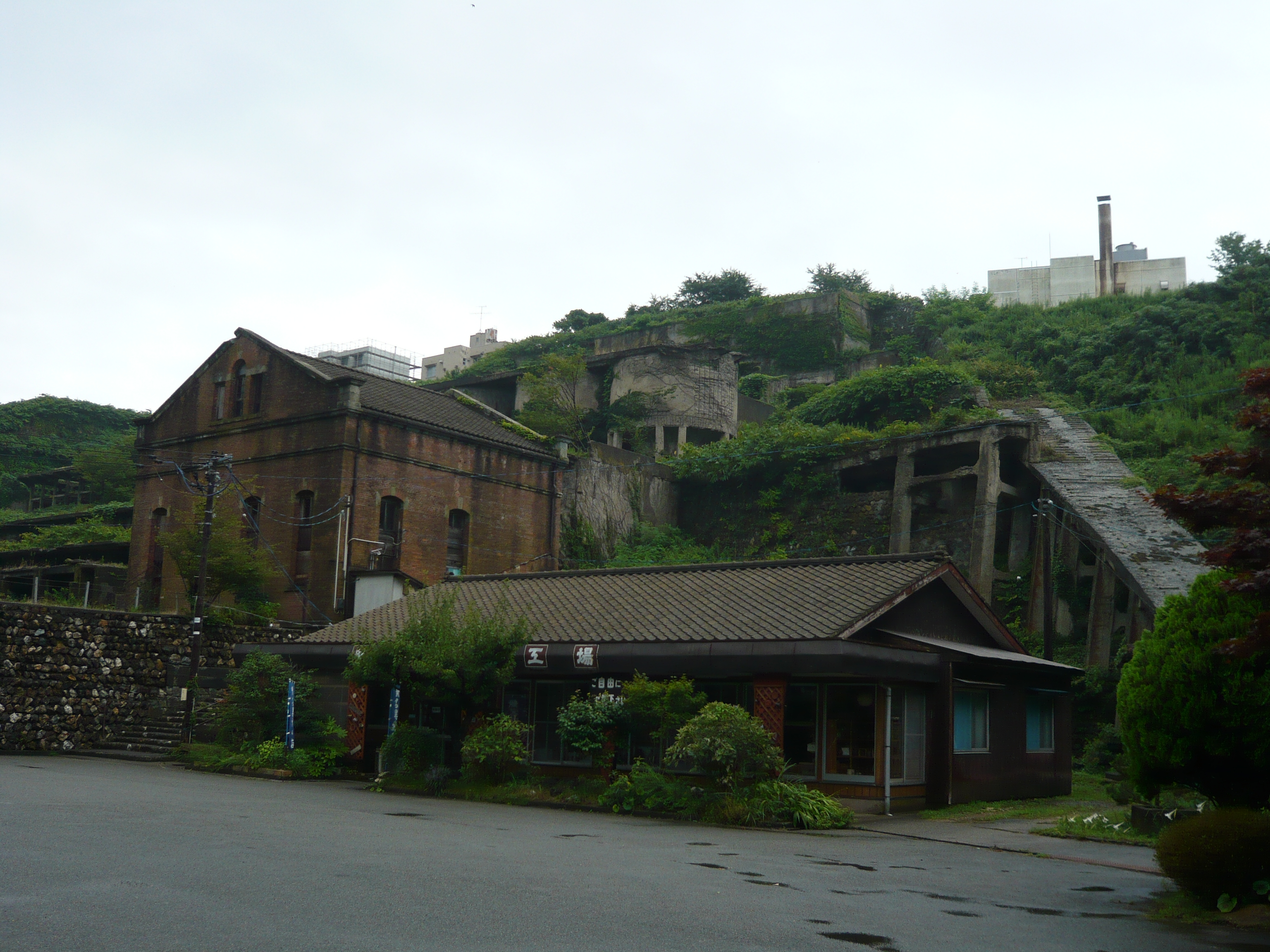 佐渡金山・北沢地区